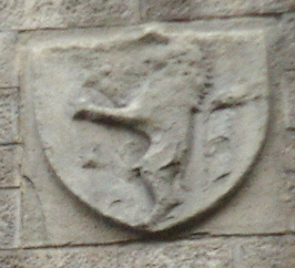 Torre dei gianfigliazzi, stemma gianfigliazzi